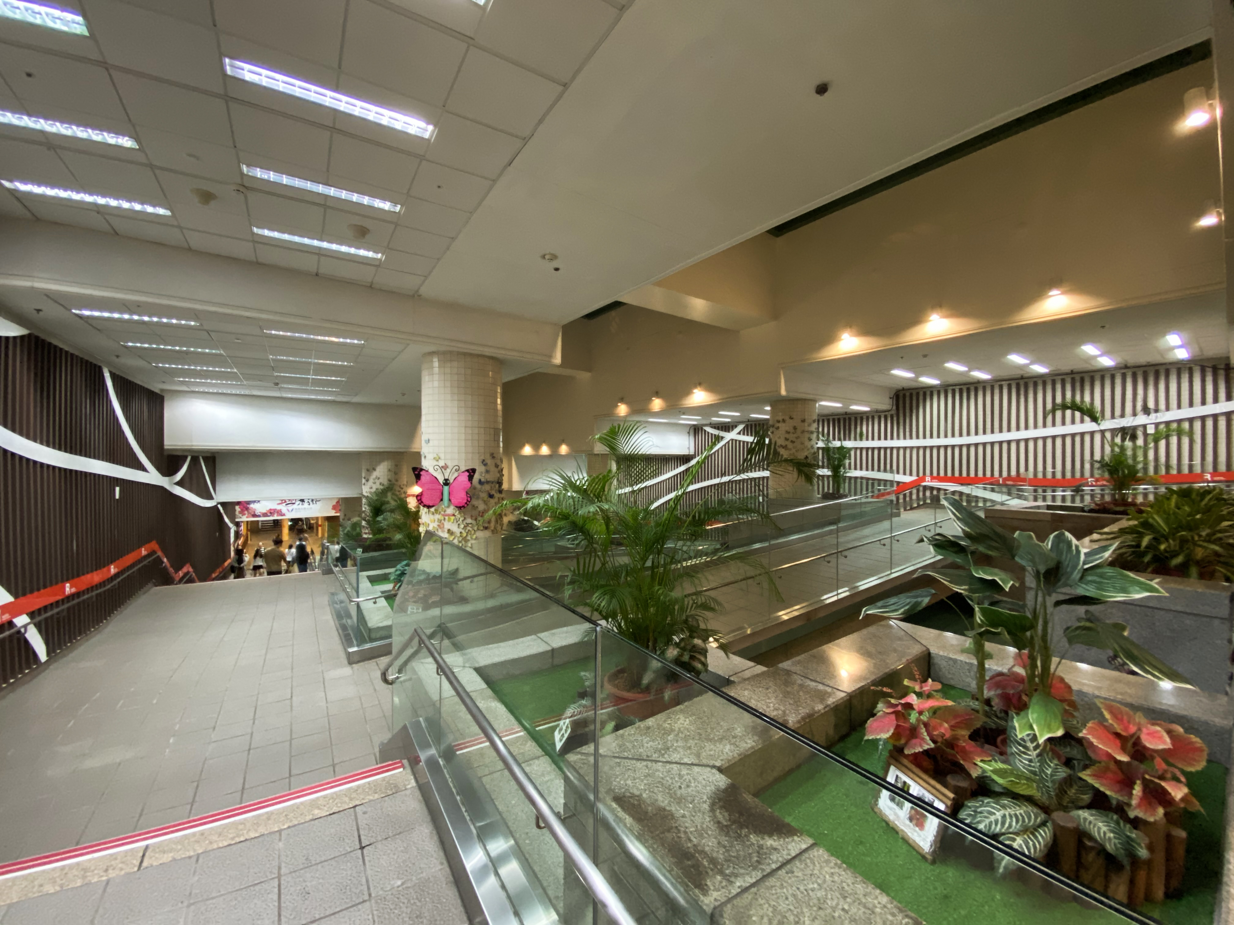 Zhongshan Metro Mall